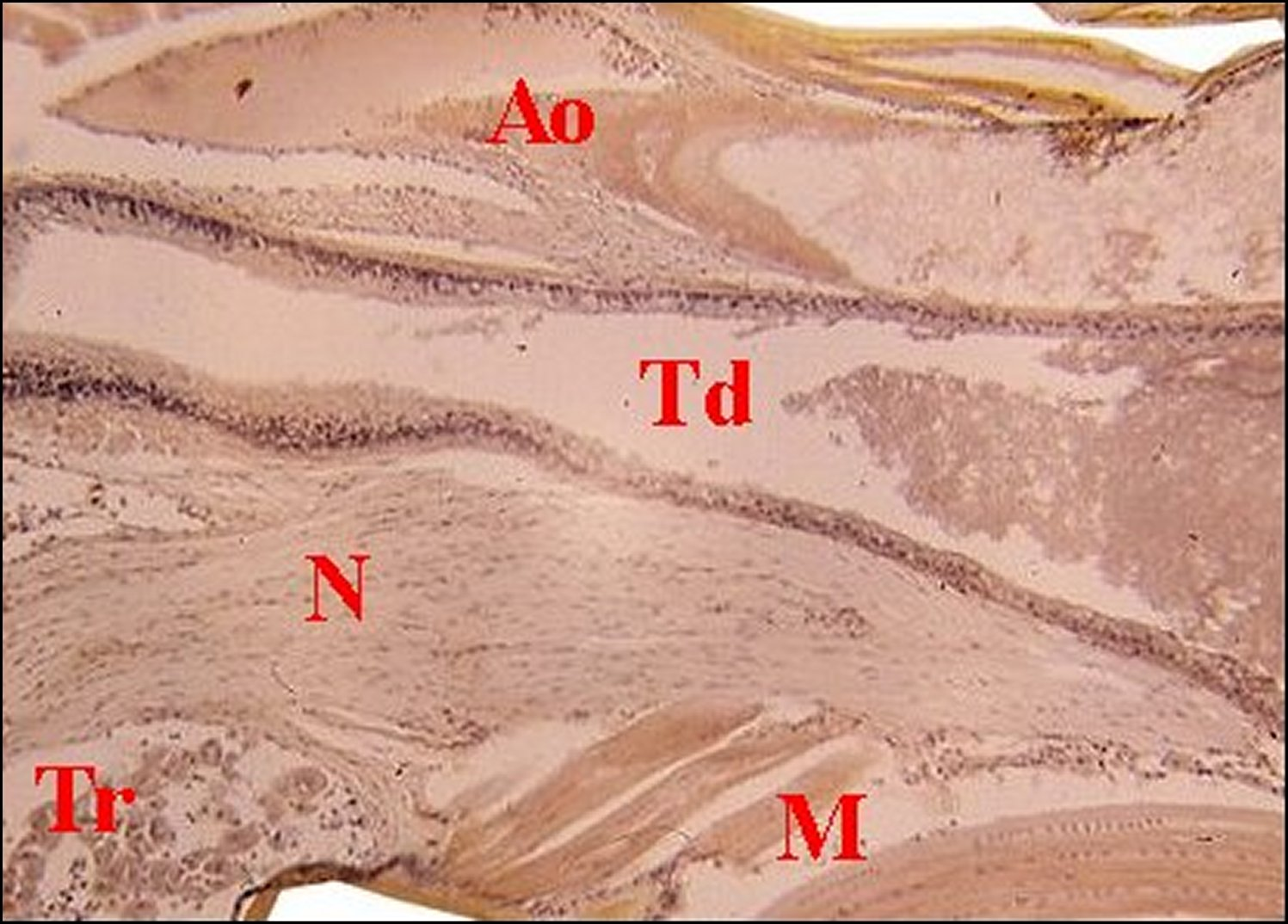 Coupe histologique longitudinale d'un pédicule d' Araignée